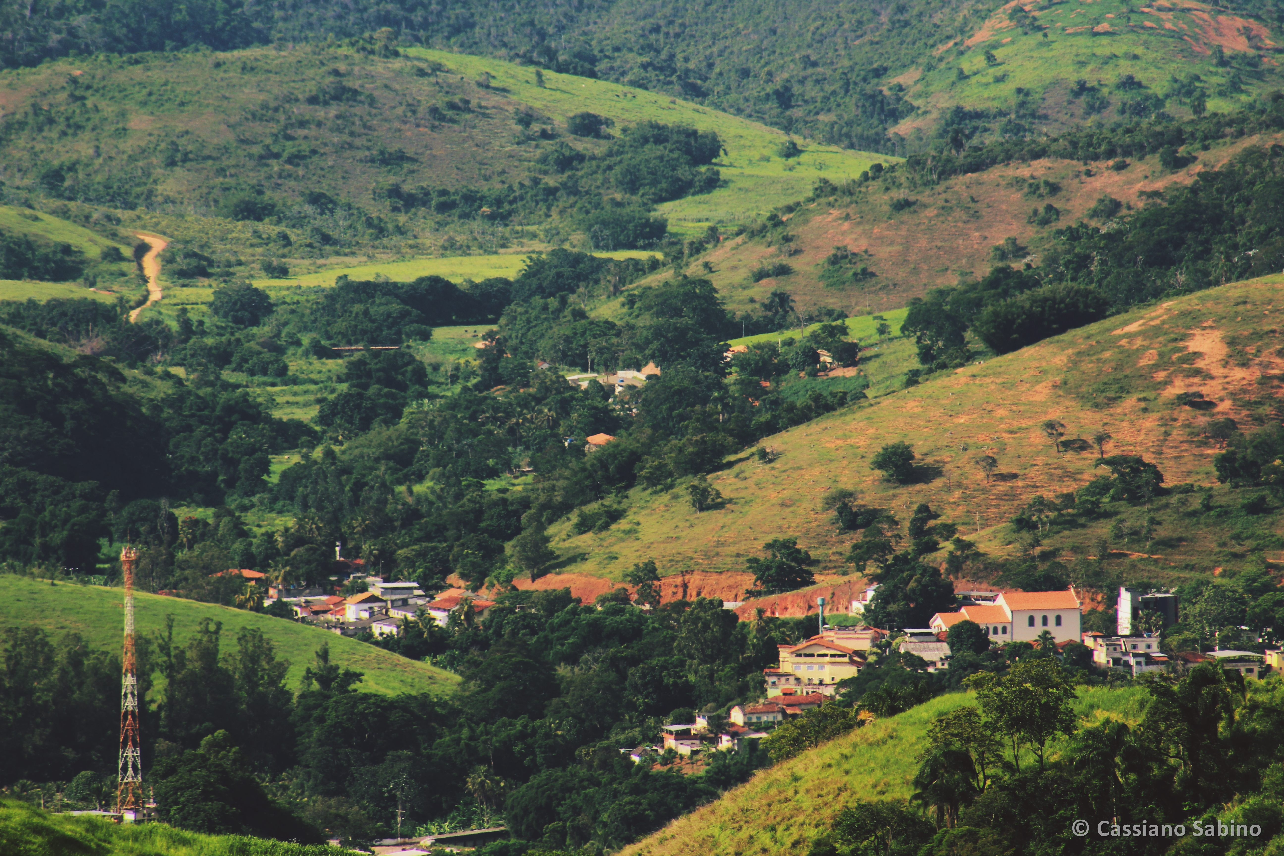 Foto capturado do alto da montanha acima da BR-267